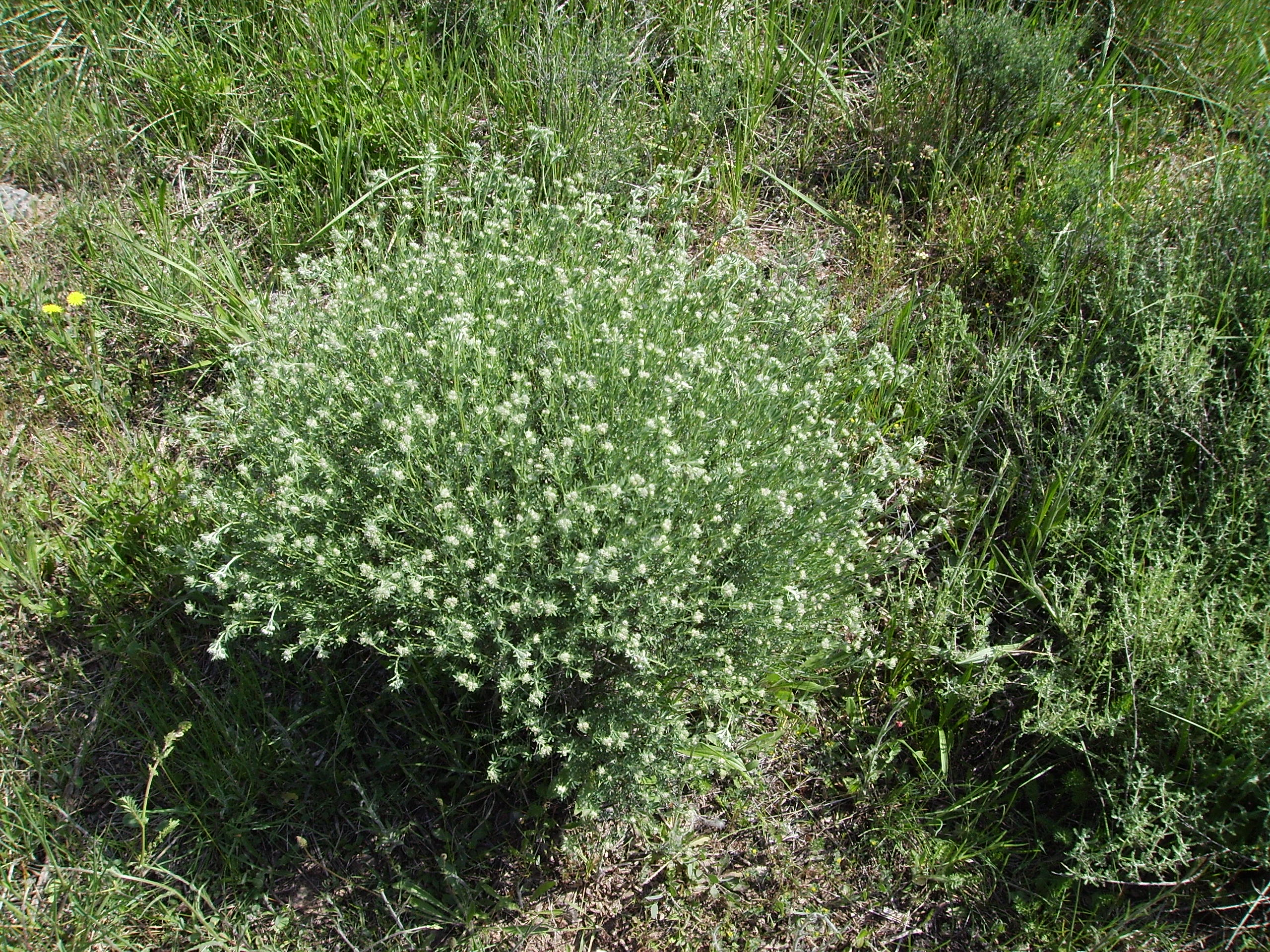 Doricnum pentaphyllum, botja d'escombres, mijediega (Fabaceae)